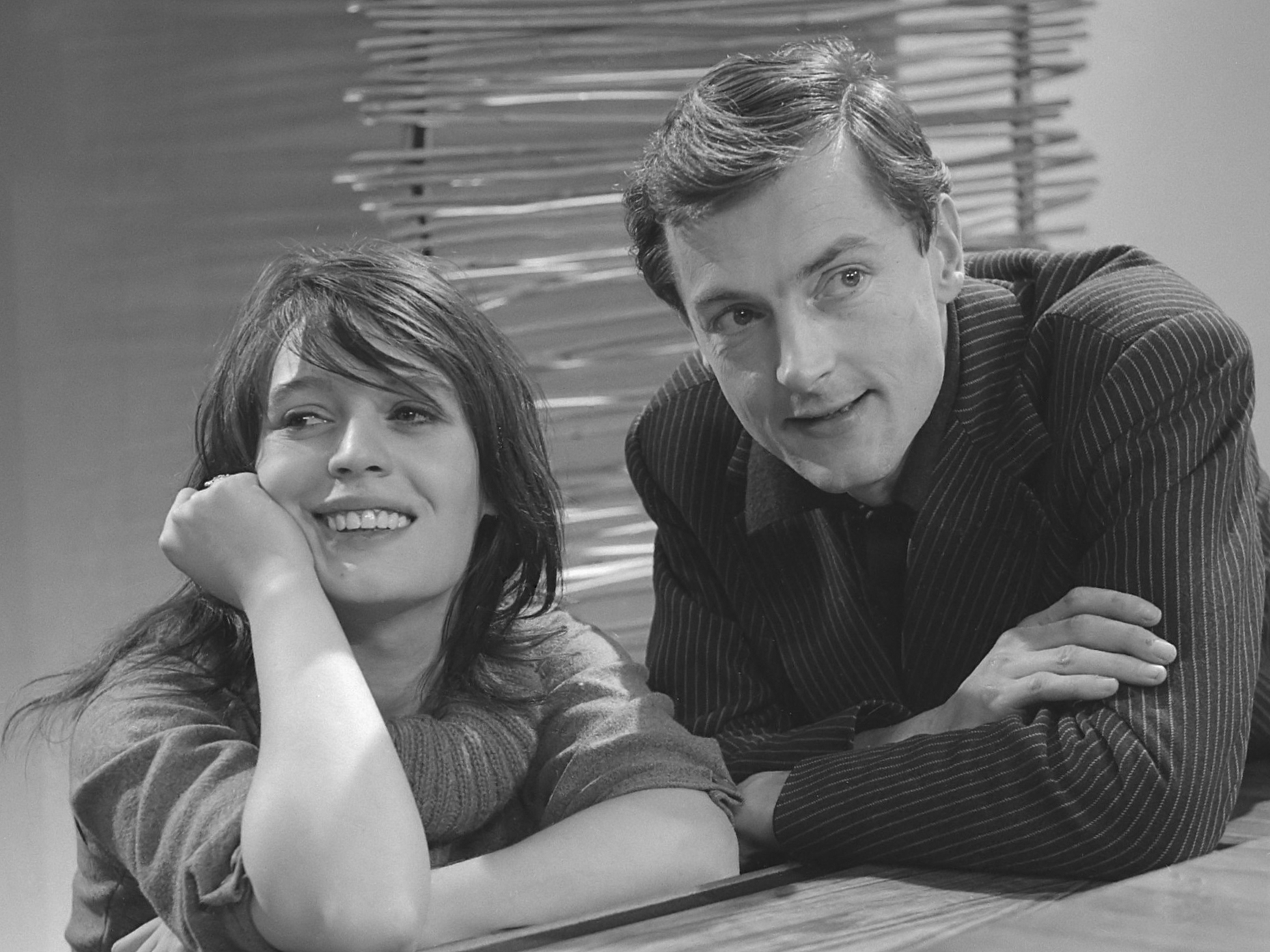 Televisiecabaretprogramma "Croissantje half om" , Wilhelmina en Doude van Herwijnen 28 december 1960